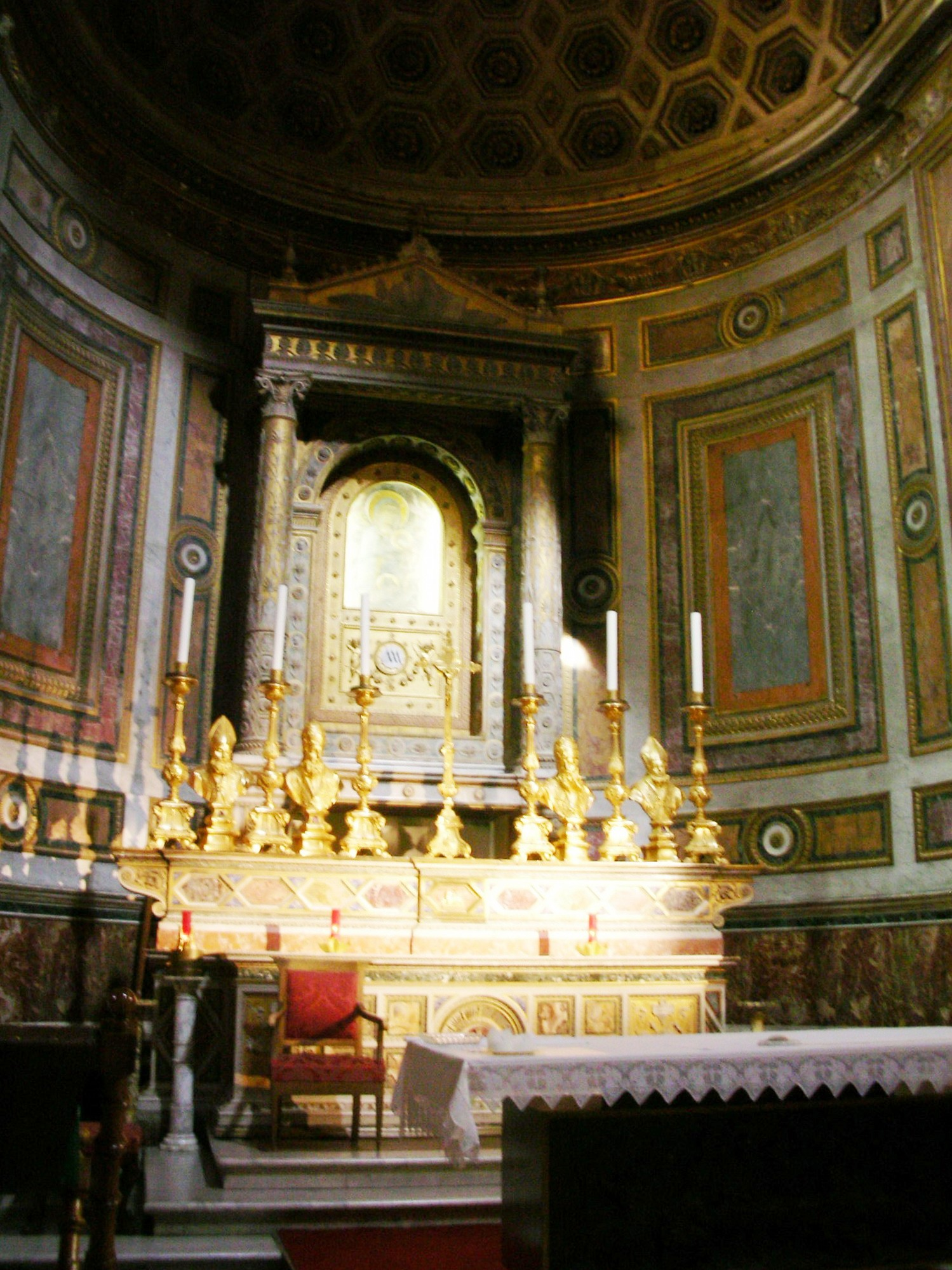 Main Altar, Santa Maria in Aquiro, Rome